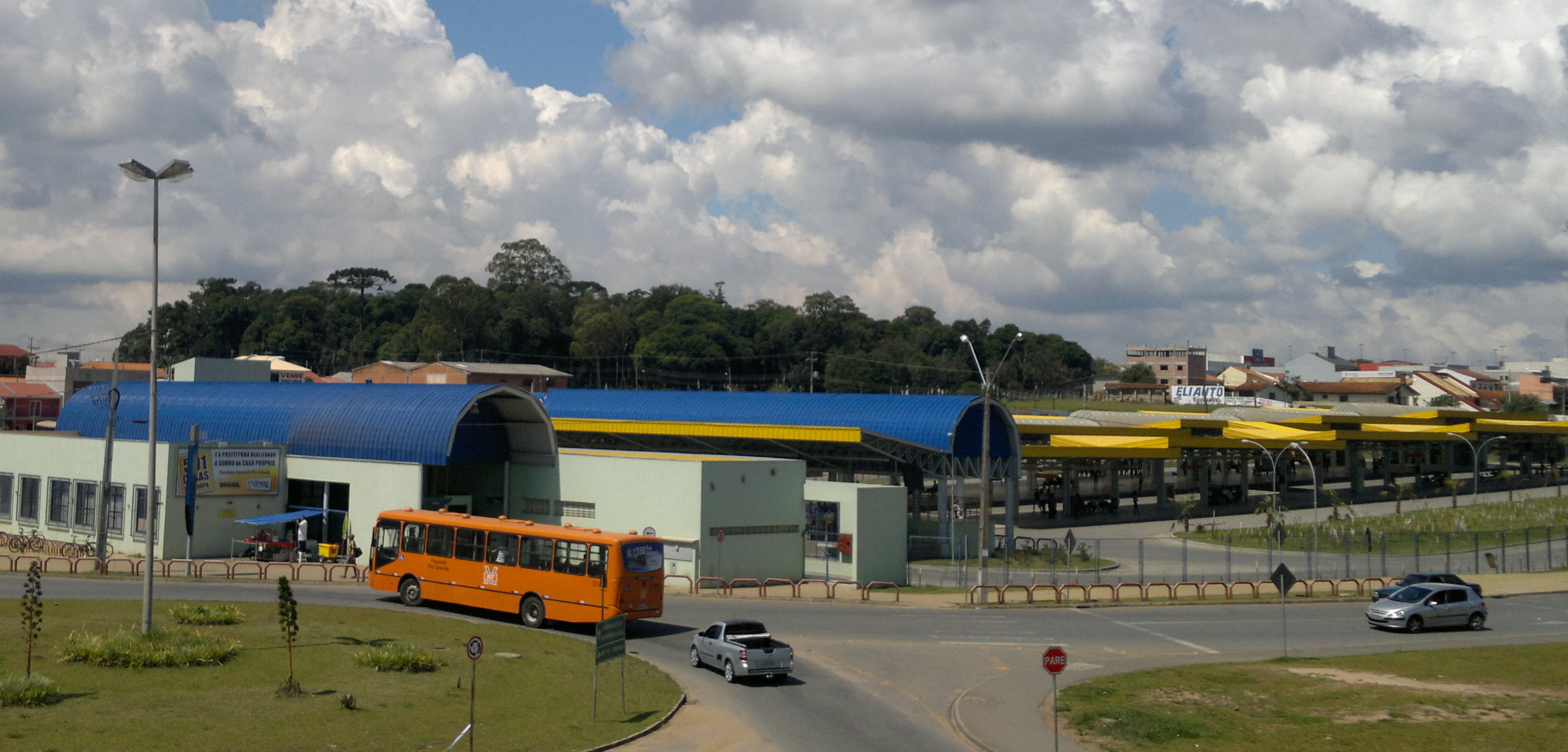 Terminal Metropolitano de Fazenda Rio Grande (Grande Curitiba), Paraná, Sul do Brasil.